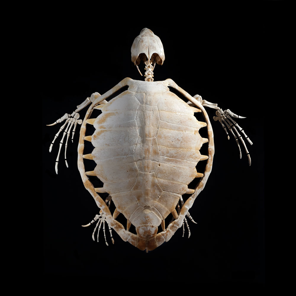 Montaje del esqueleto de tortuga boba. El ejemplar marcado provenía de Nápoles (Italia) y apareció muerto en Cullera (España). Fue cedido por el centro de recuperación de fauna Granja el Saler. Previa autopsia, fue descarnado, limpiado y tratado para el posterior montaje. El aprovechamiento de fauna cadavérica posee múltiples funciones didácticas multinivel, desde el estudio de la anatomía de vertebrados salvajes, sus convergencias evolutivas o la sensibilización medioambiental del público para mejorar su estado de conservación en el medio natural.